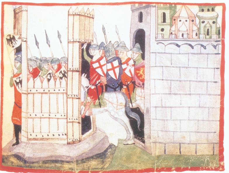 Die Abbildung von Gioivanni Villani zeigt den Einfall der bewaffnetten Parmesen 1248 in die Holzstadt Vittoria.